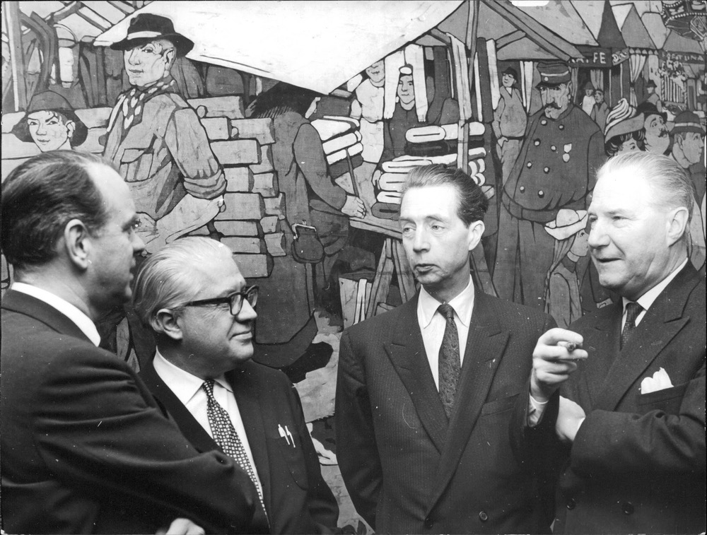 Gösta Folke, Lars-Levi Læstadius, Karl Ragnar Gierow och Arthur Hilton vid Teatrarnas riksförbunds årsmöte på rådhuset i Malmö. Bilden publicerades i Svenska Dagbladet 1962-11-01 sid 18 (